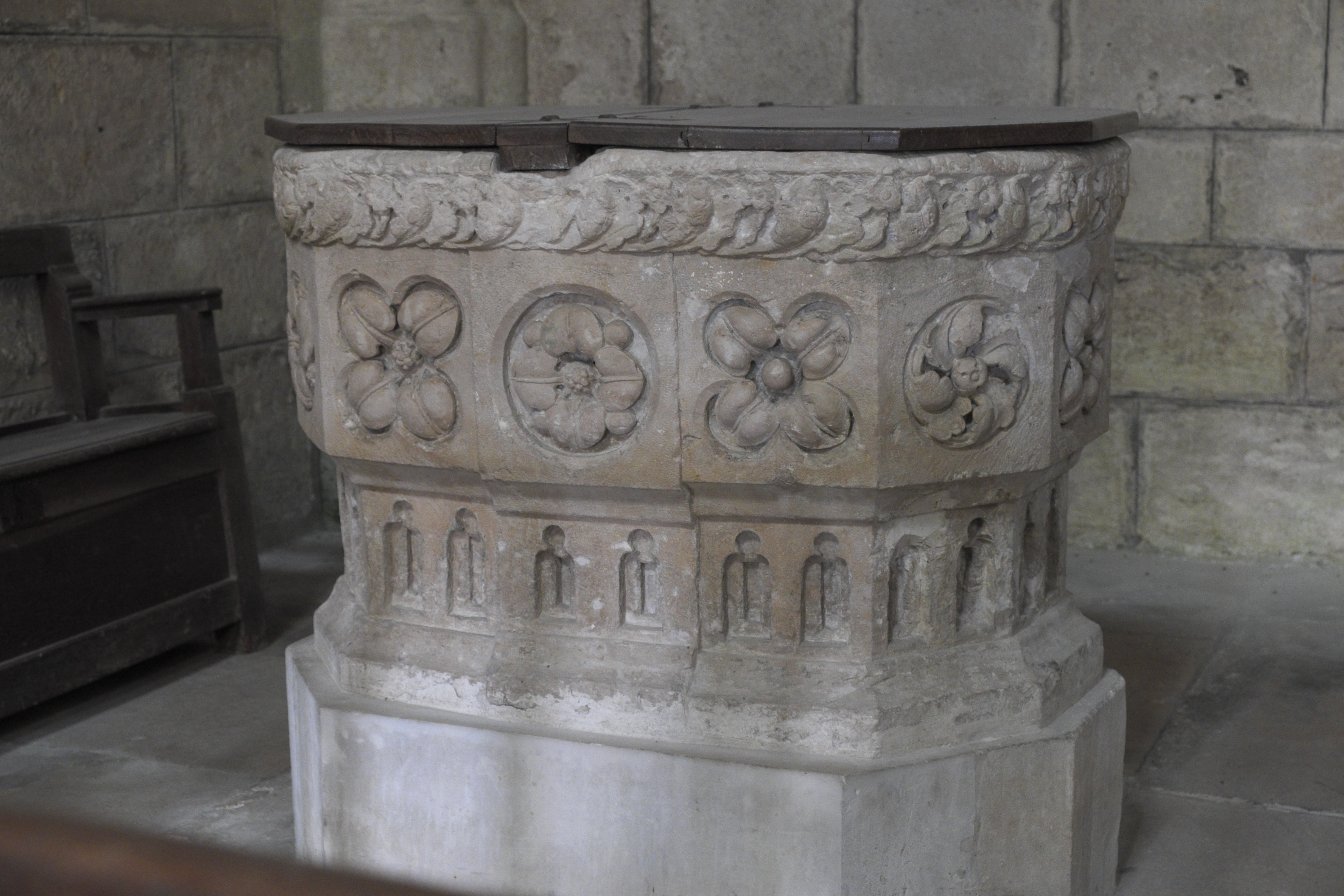 Katholische Pfarrkirche Notre-Dame in Vétheuil im Département Val-d’Oise in der Region Île-de-France (Frankreich), Taufbecken